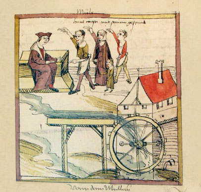 Der Volkacher Müller der Schaubmühle beim Eid vor dem Bürgermeister. Volkacher Salbuch, folio 441r